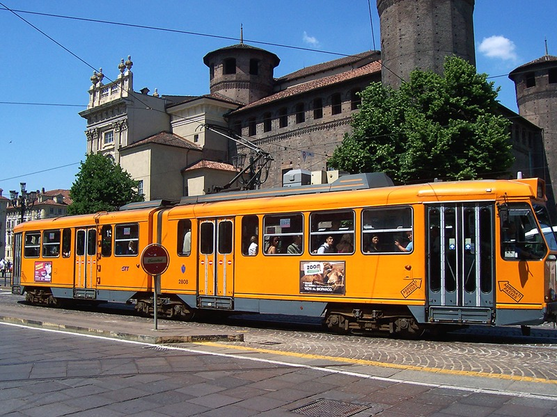 Torino - Tram in Piazza Castello